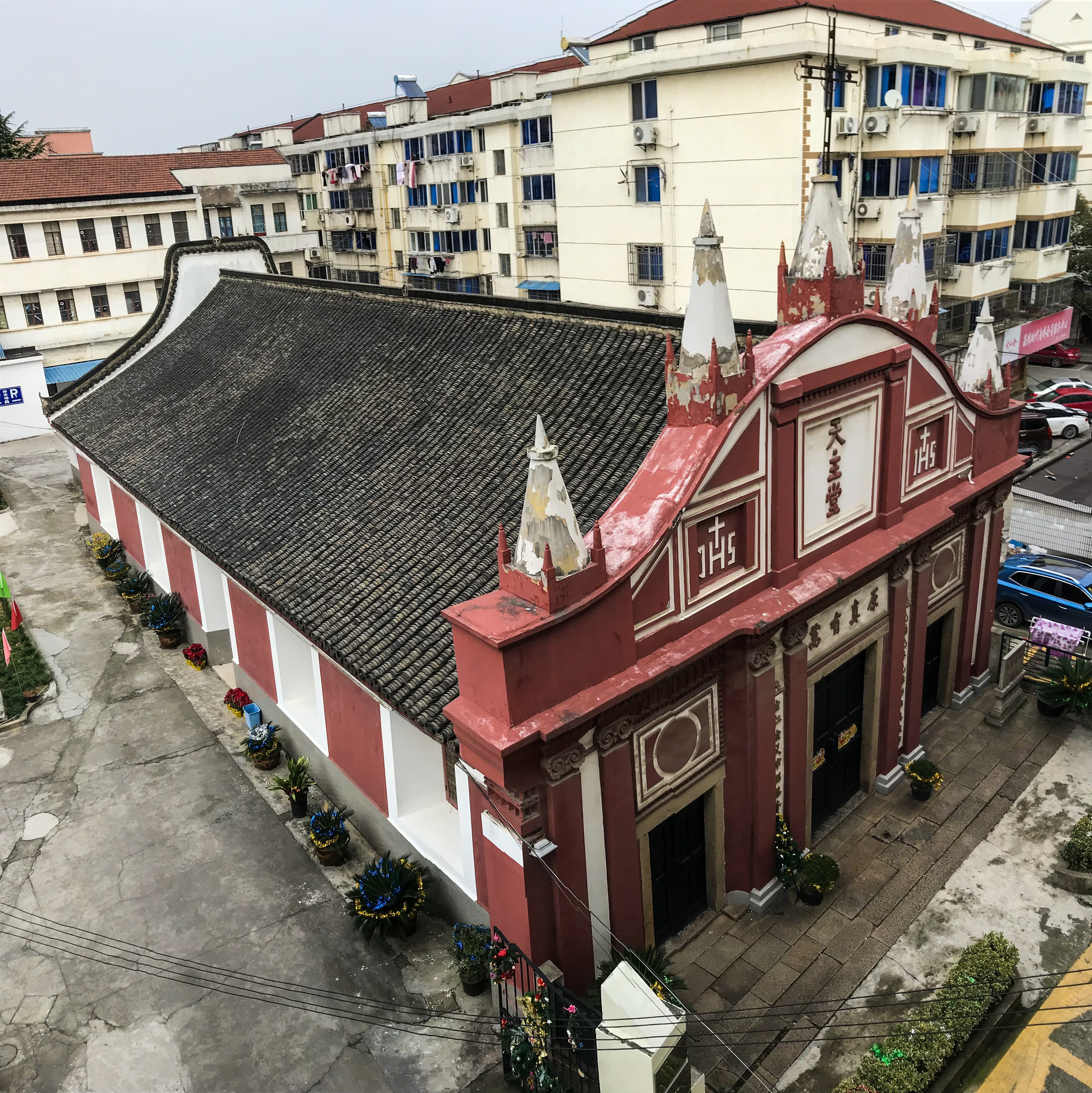 卜罗德祠 南桥镇新建西路